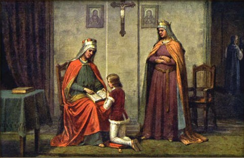 Josef Mathauser - kněžna Drahomíra, kníže Václav a Ludmila